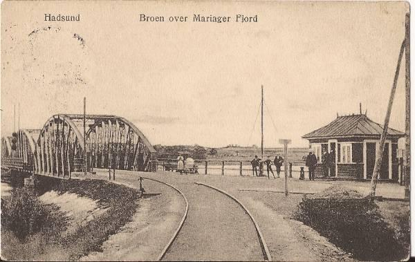 Hadsundbroen over mariagerfjord i 1912